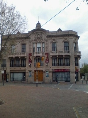 San Josè , Uruguay